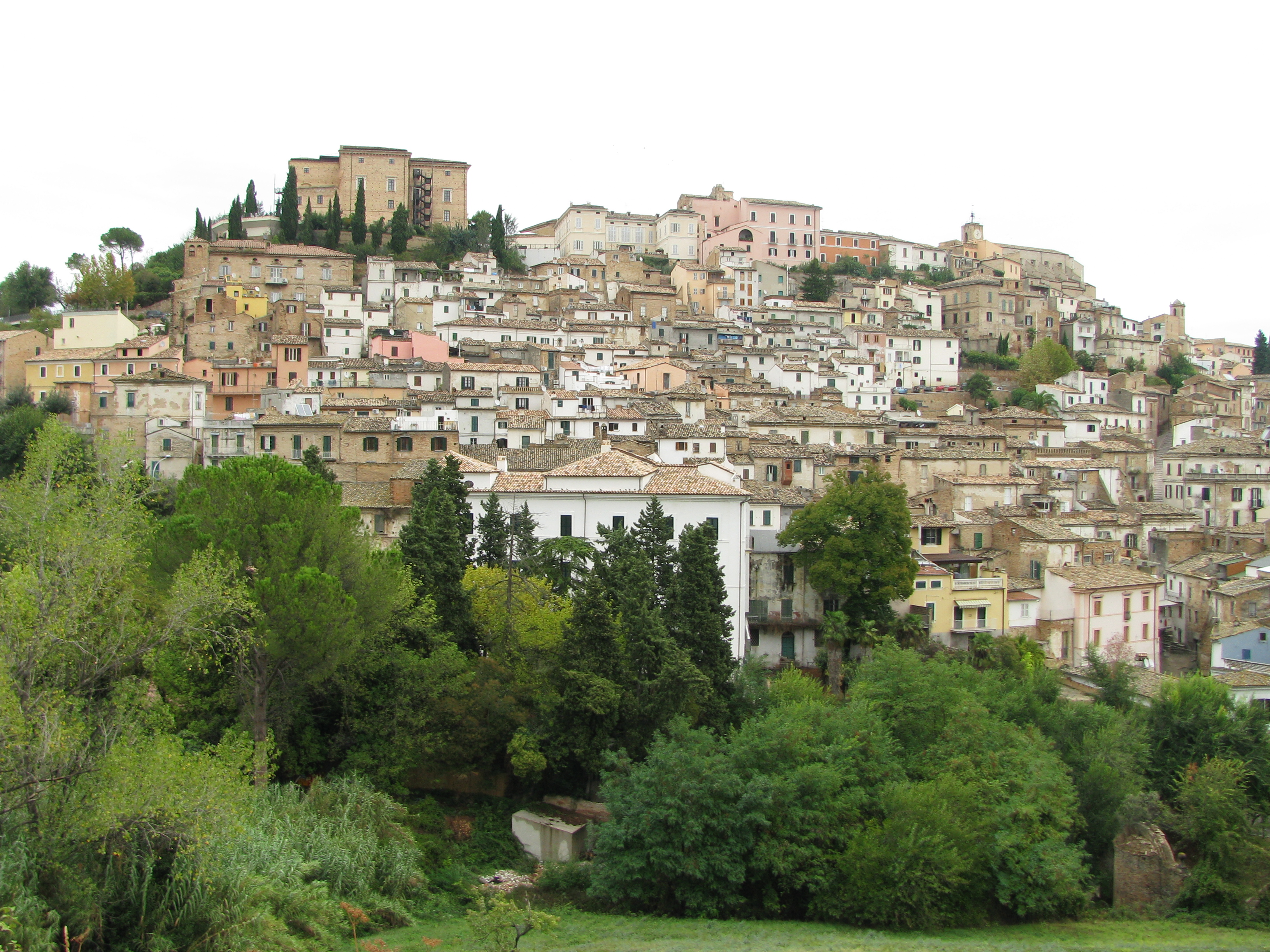 Autore: Albert